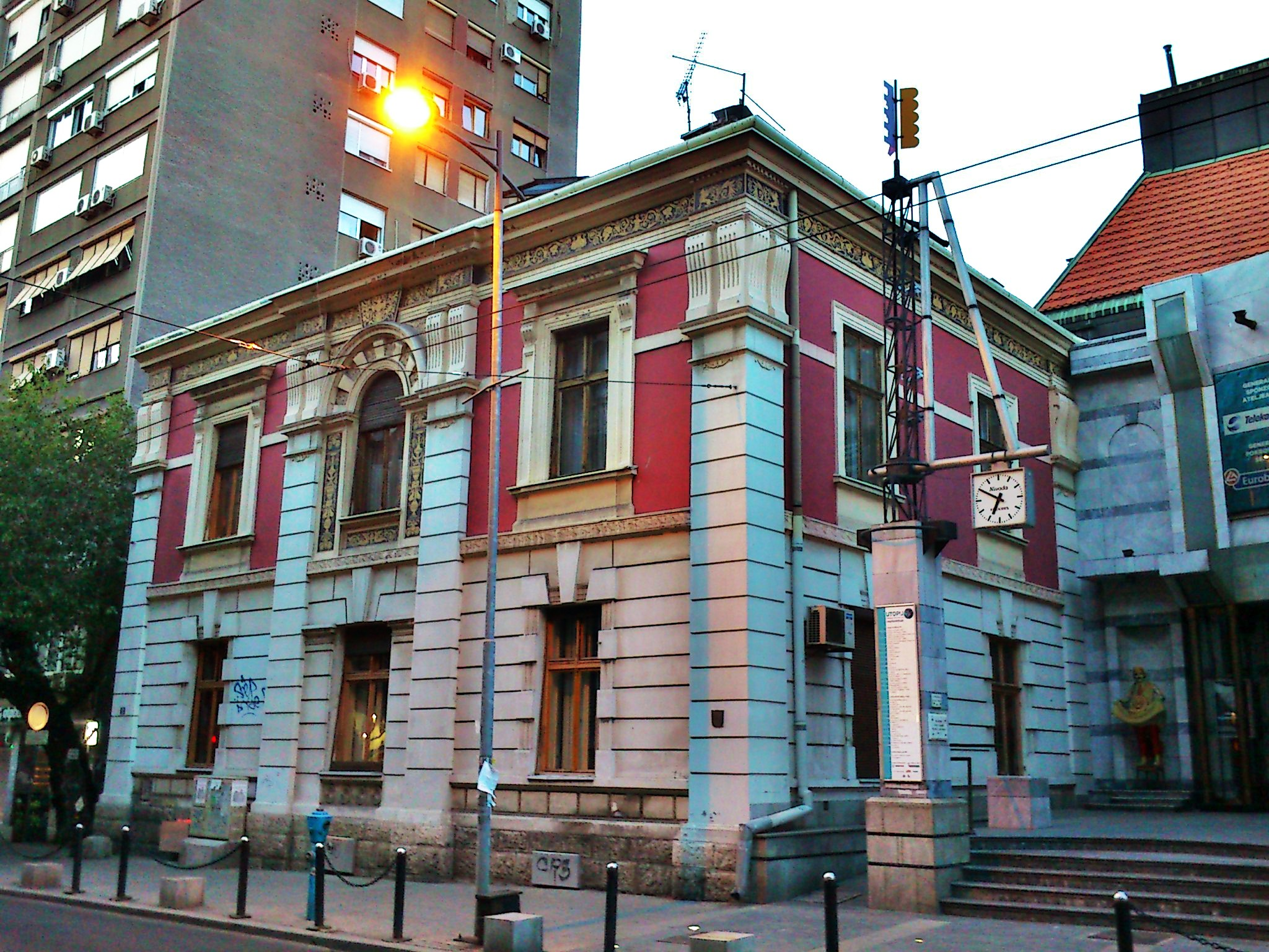 Дом Јеврема Грујића